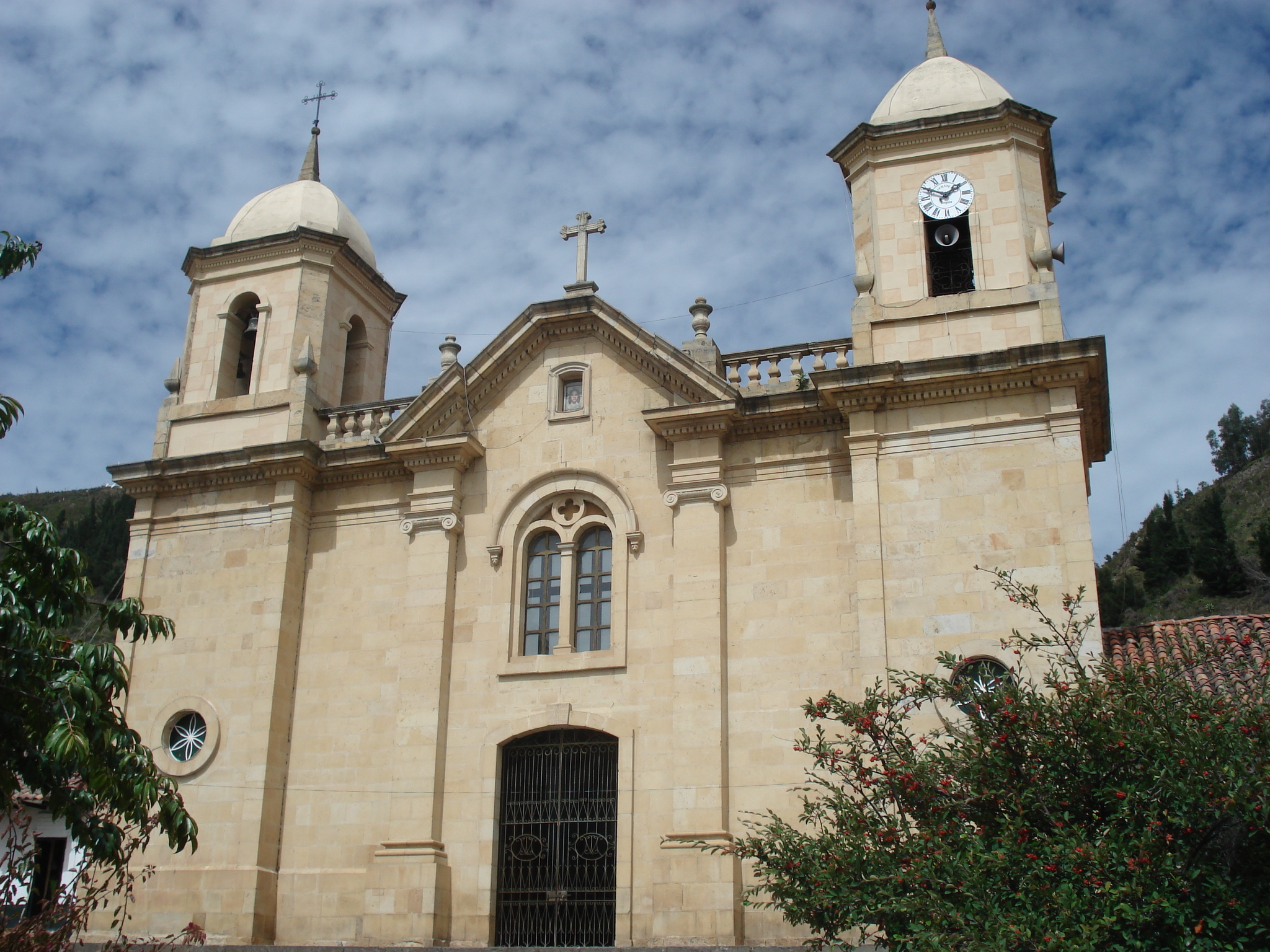 Iglesia principal de Cucunubá, Cundinamarca